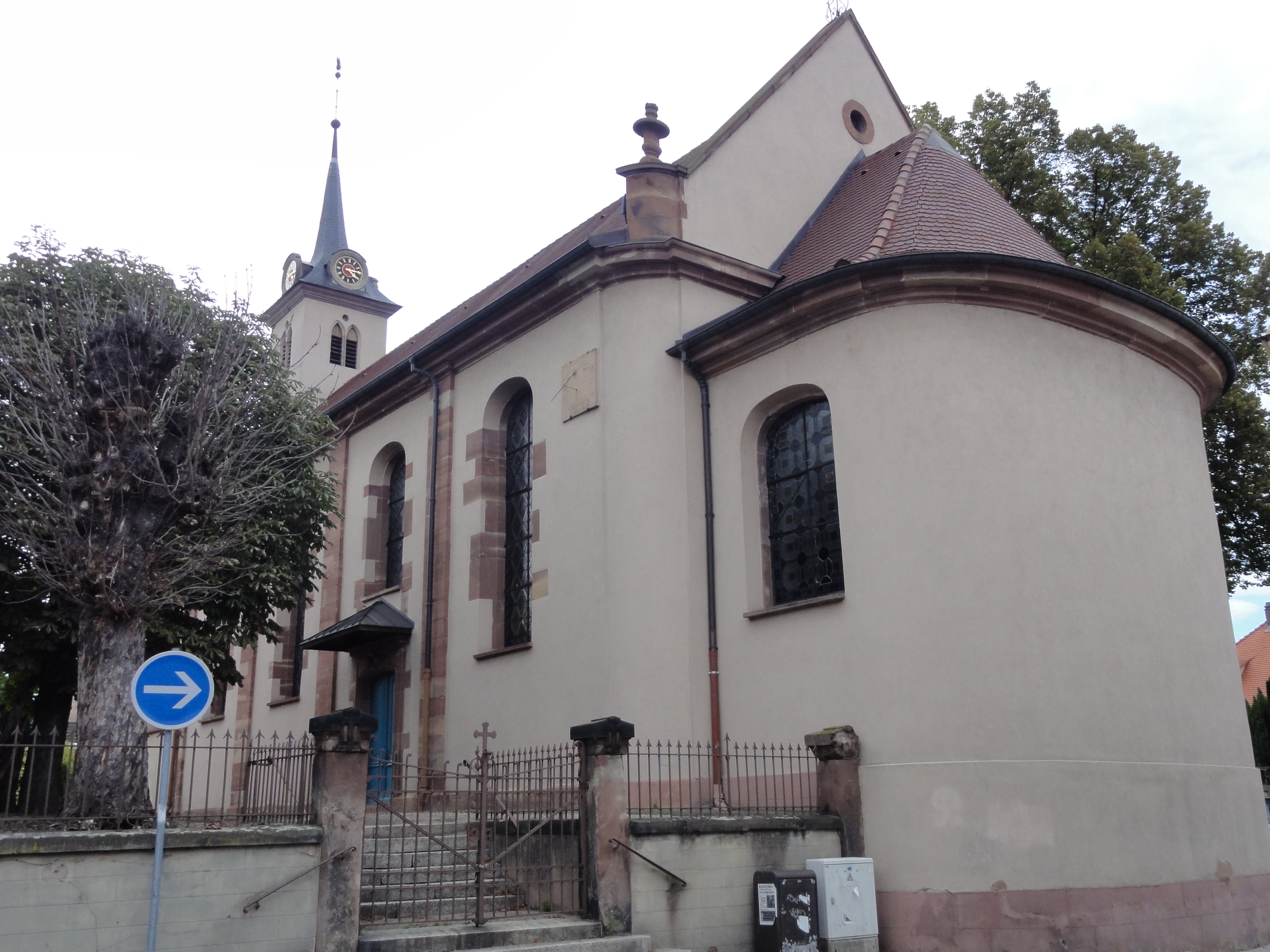 Alsace, Bas-Rhin, Schiltigheim, Église protestante (PA00125226, IA67018001).